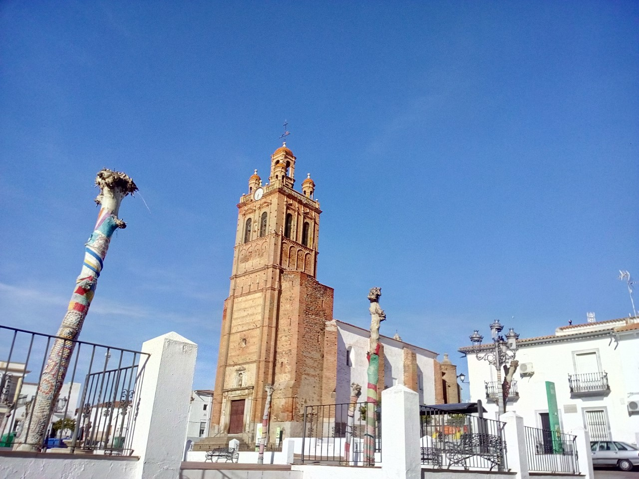 Valverde de Llerena